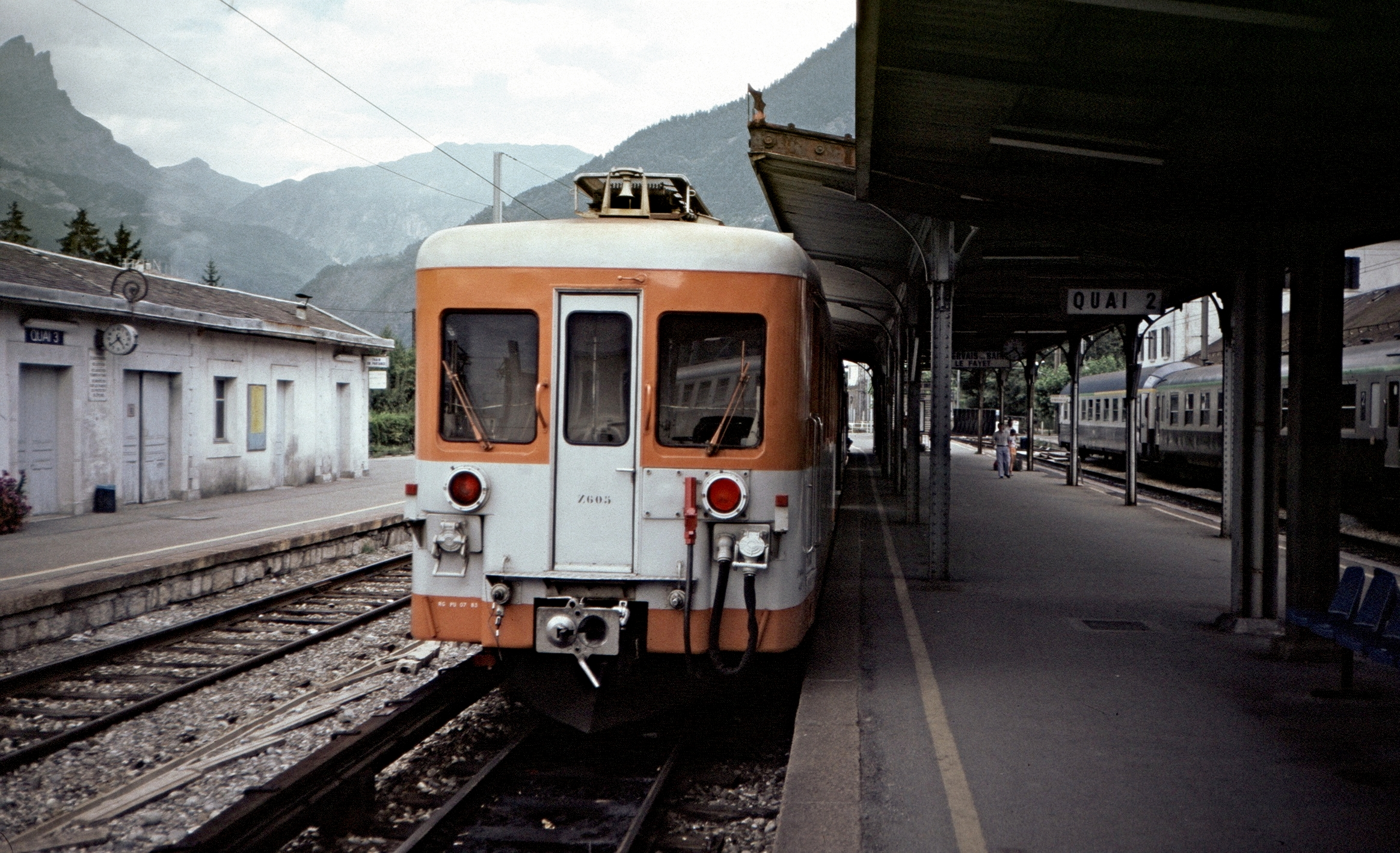 Rame à voie métrique au Fayet